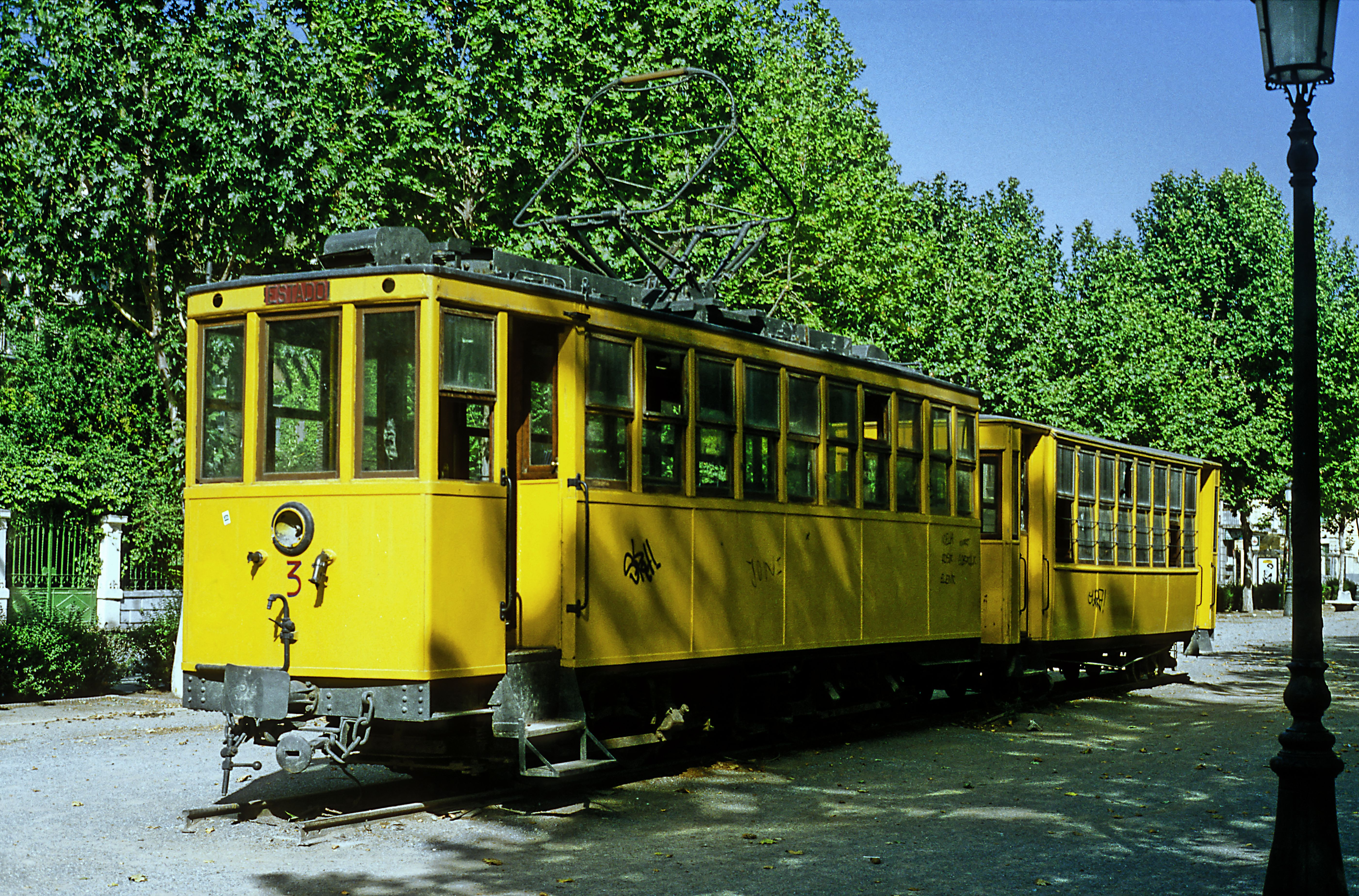 Triebwagen 3 der »Ferrocarril Eléctrico de la Sierra Nevada«, als Denkmal abgestellt zwischen Río Genil und Paseo de la Bomba. Im Beiwagen befand sich eine Kinderbibliothek, doch war sie zum Aufnahmezeitpunkt schon geschlossen.